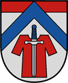 Marktgemeinde St. Martin i. M.